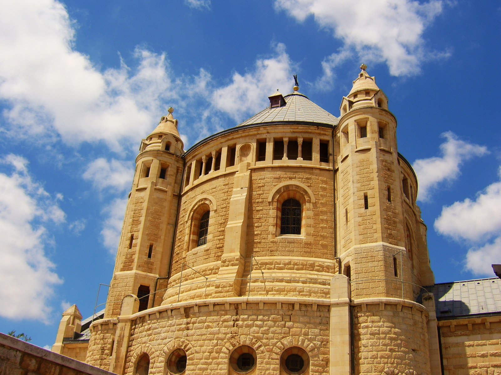 Kościoł Zaśnięcia Najświętszej Marii Panny na Syjonie w Jerozolimie